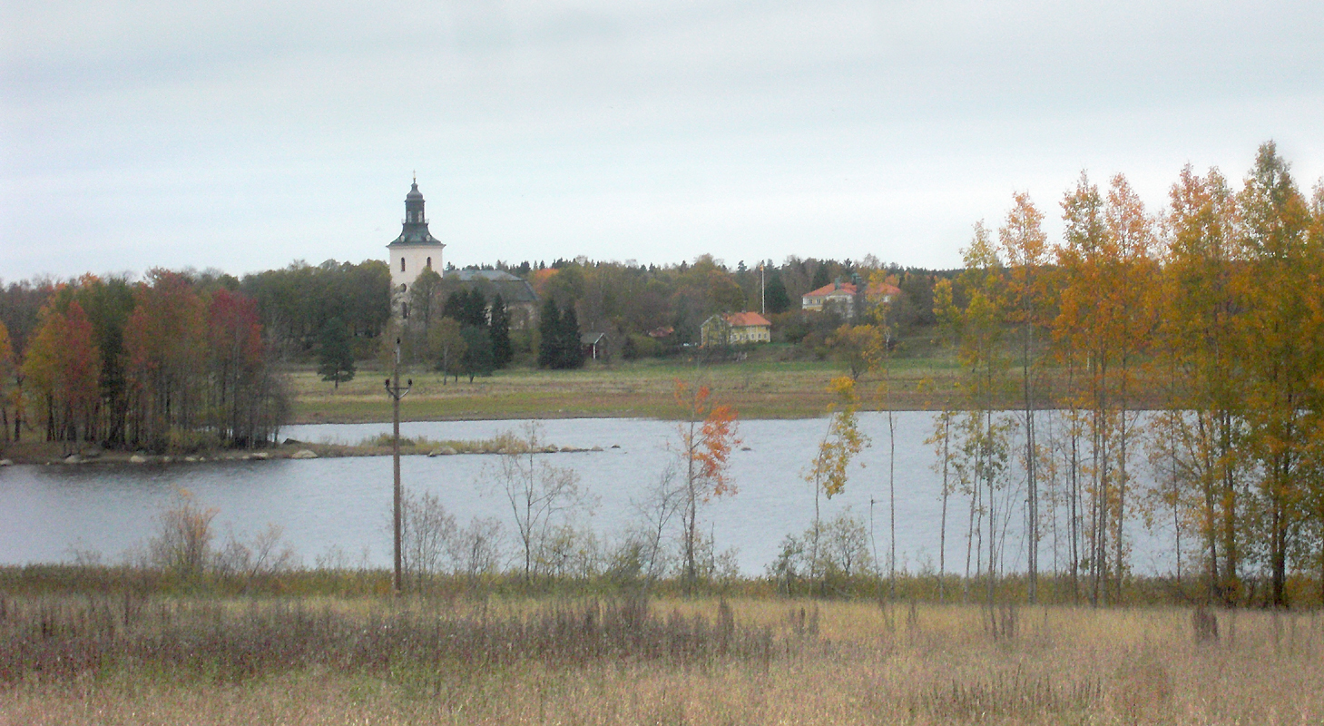 By kyrka sedd från sydväst över Bysjön i By socken, Folkare härad, Avesta kommun, Västerås stift, Dalarnas län, Dalarna, Sverige. Bysjön är en del av Dalälven.